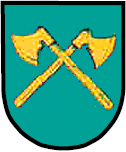 Herb Kopienicy (gmina Zbrosławice, powiat tarnogórski, województwo śląskie, Polska)